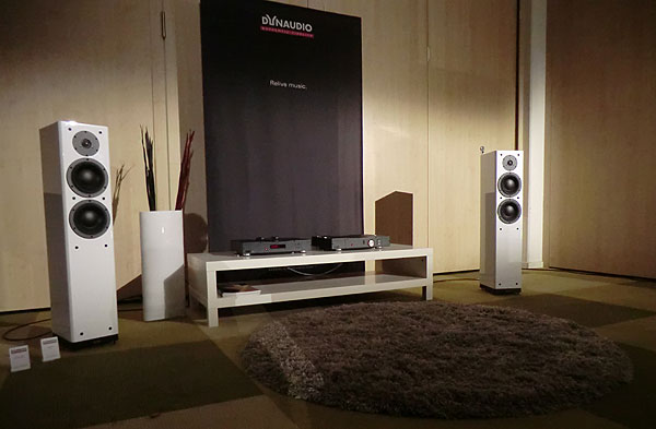 Messeaustellung